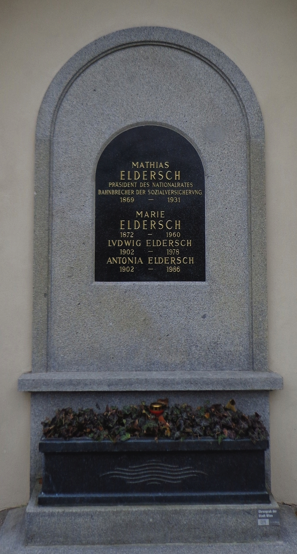 Feuerhalle Simmering - Abteilung ML (Umfassungsmauer): Urnengrab von Mathias Eldersch